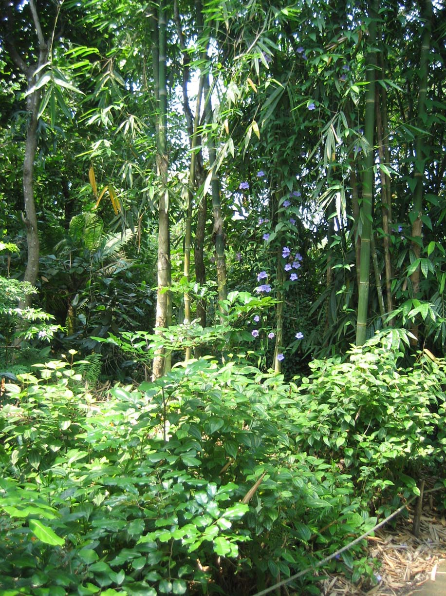 in der Masoalahalle